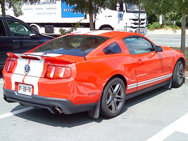 Mustang Cobra Shelby GT 500